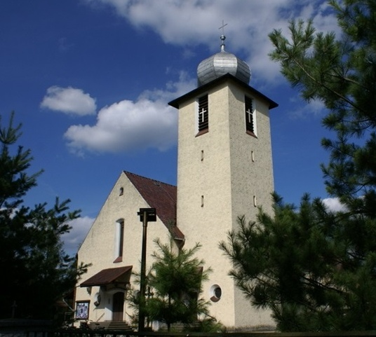 Kościół św. Antoniego Padewskiego w Dylakach